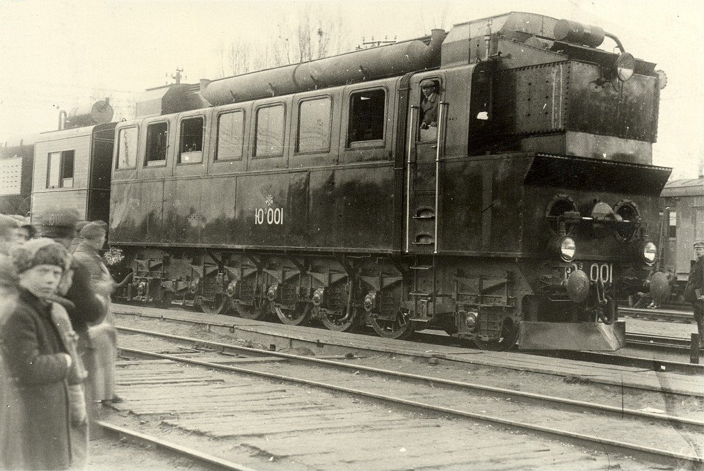 Опытный тепловоз Юэ-001 (позже переименован в ЭЭЛ2) в Киеве